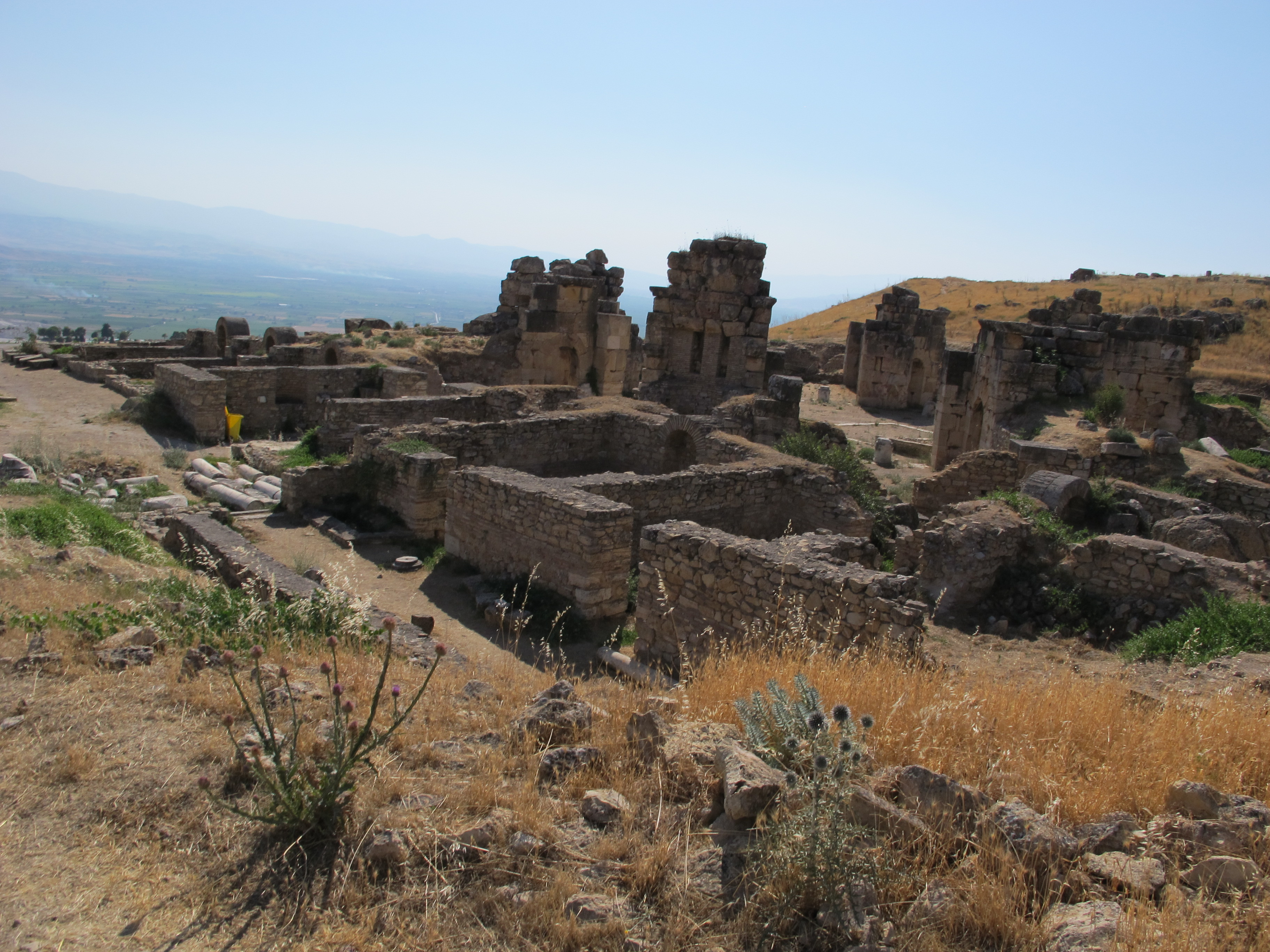 Hyerapolis, martyrion di san filippo